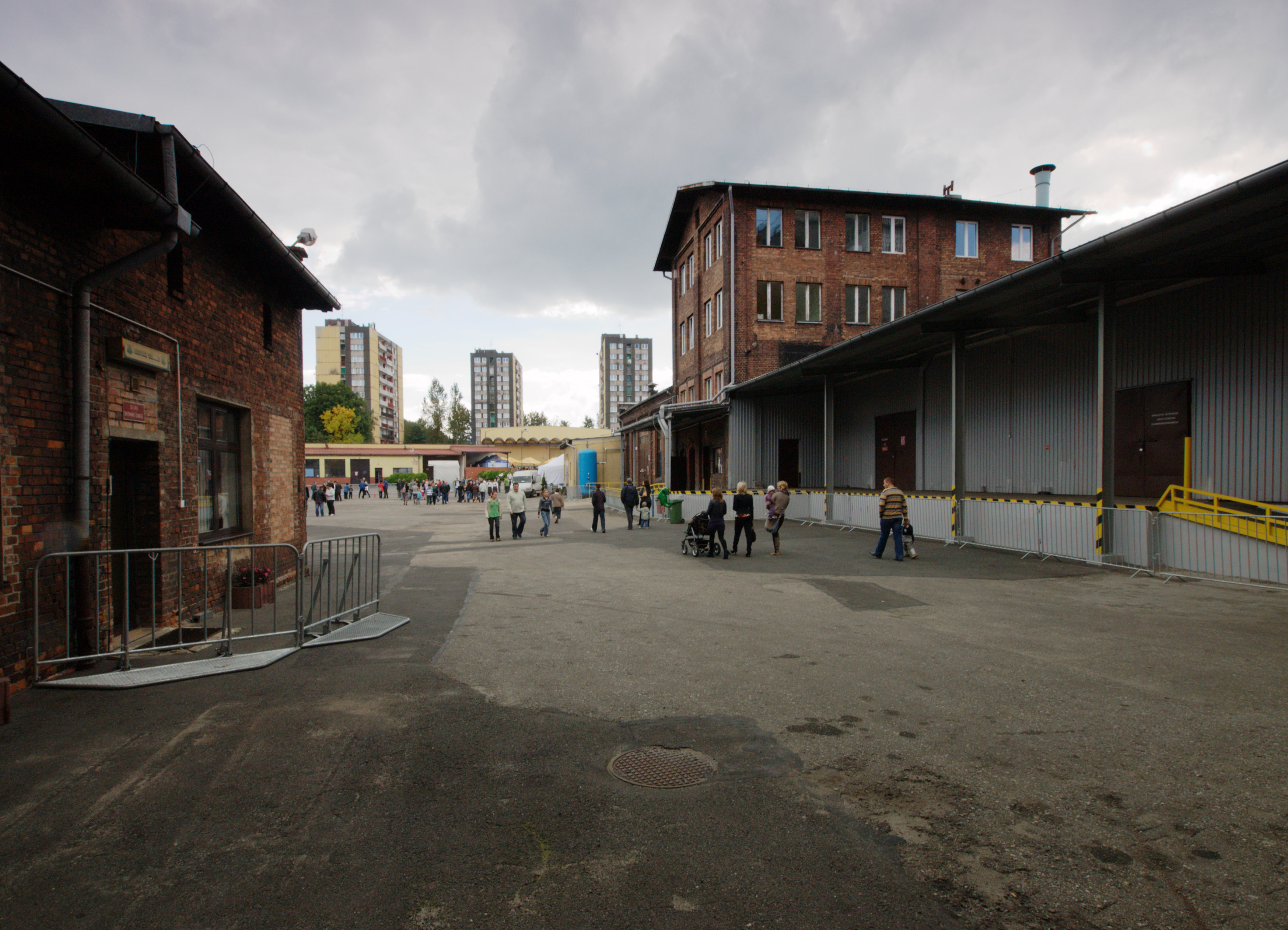 Browary Górnośląskie w Zabrzu. Dziedziniec w centrum browaru.